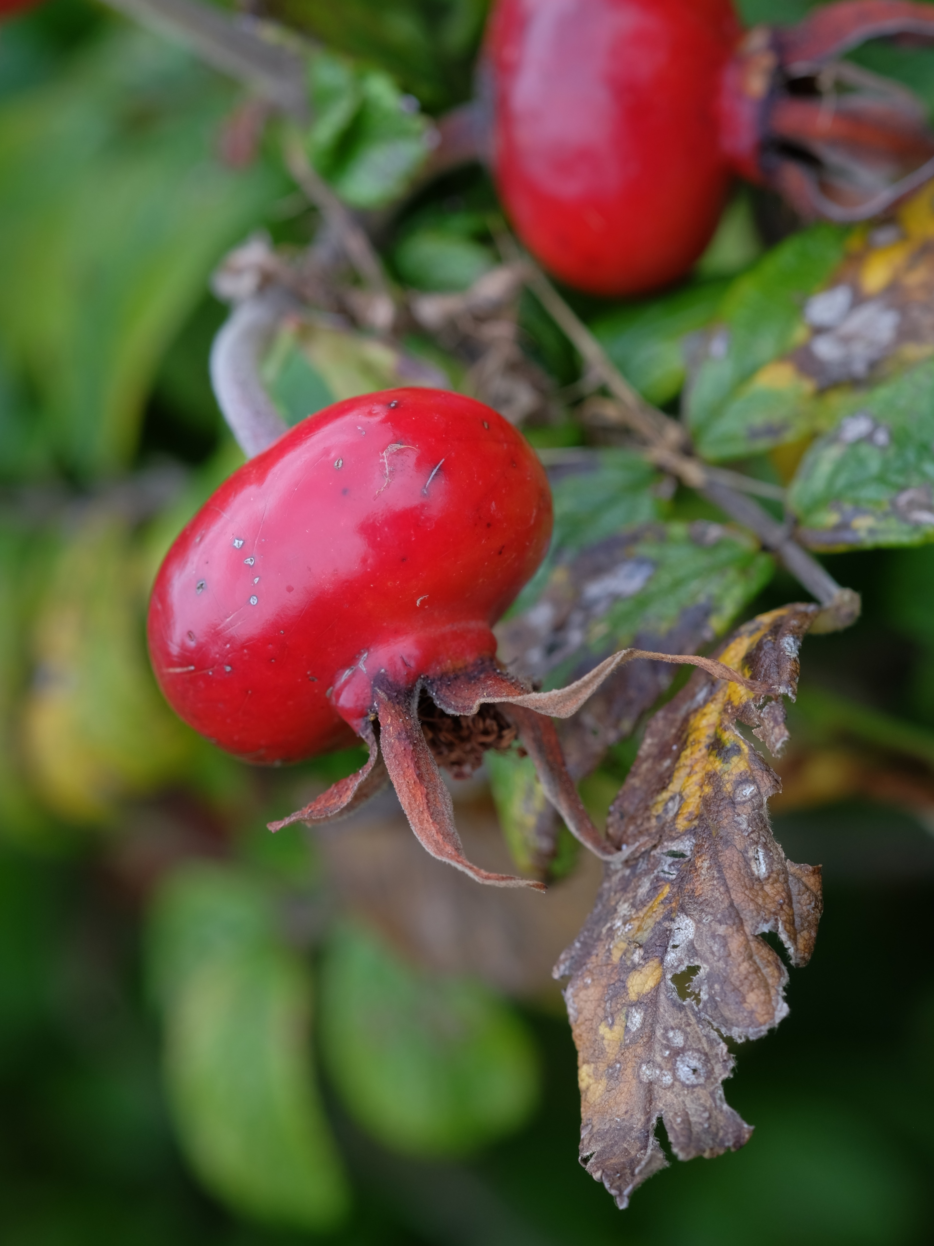 Faux-fruits du rosier (Cynorhodon), Landes, France